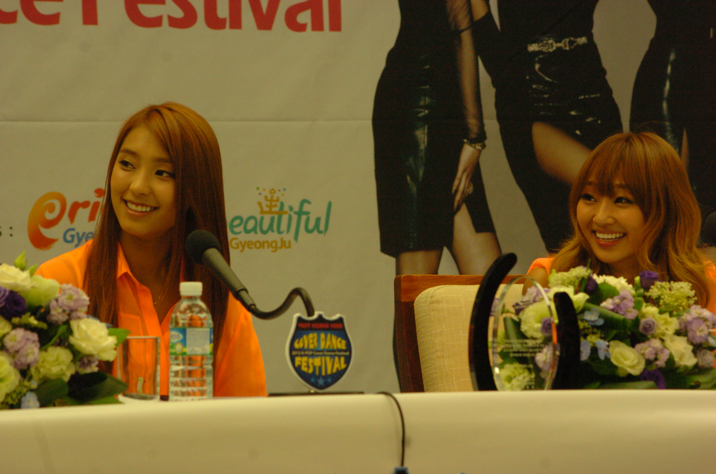 2012K-POP댄스커버페스티벌&친애하는당신에게 365